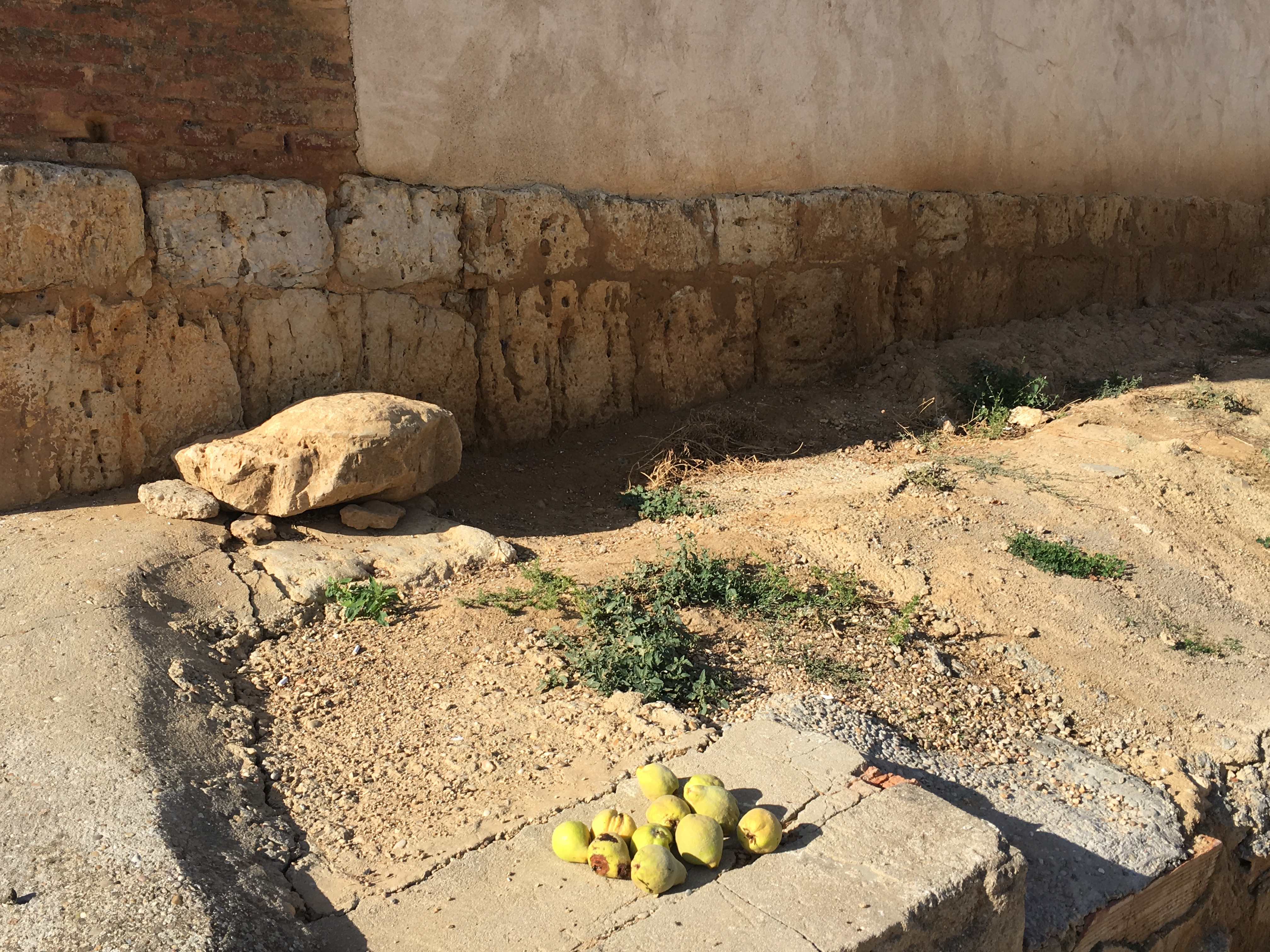 Villaesper Milenario